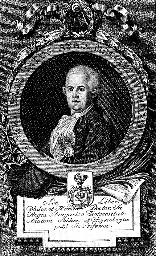 Rácz Sámuel (Pest, 1744. március 30. – Pest, 1807. február 24.) bölcseleti és orvosdoktor, egyetemi tanár. A magyar nyelvű orvosi oktatás úttörője.